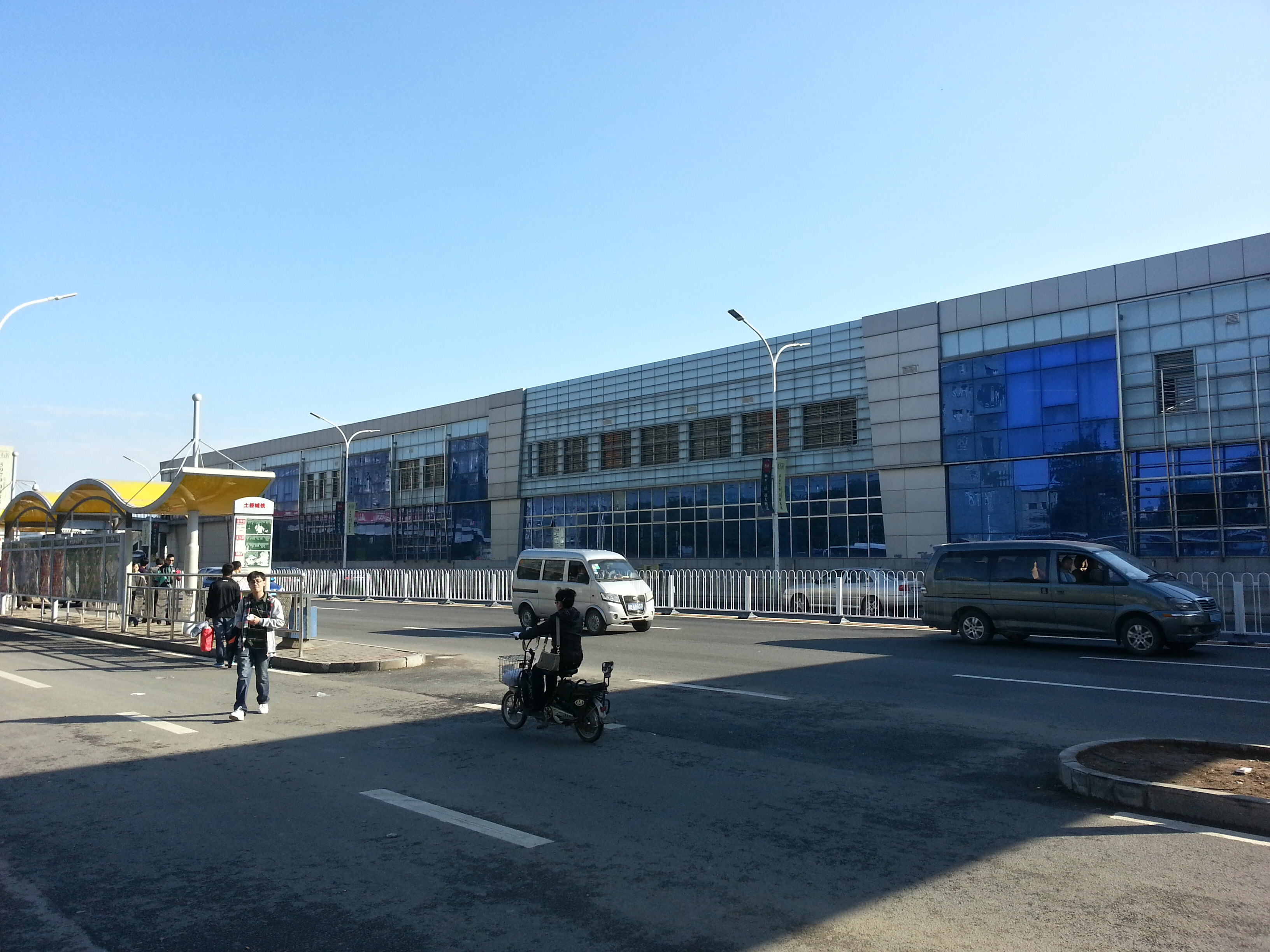 土桥站外观